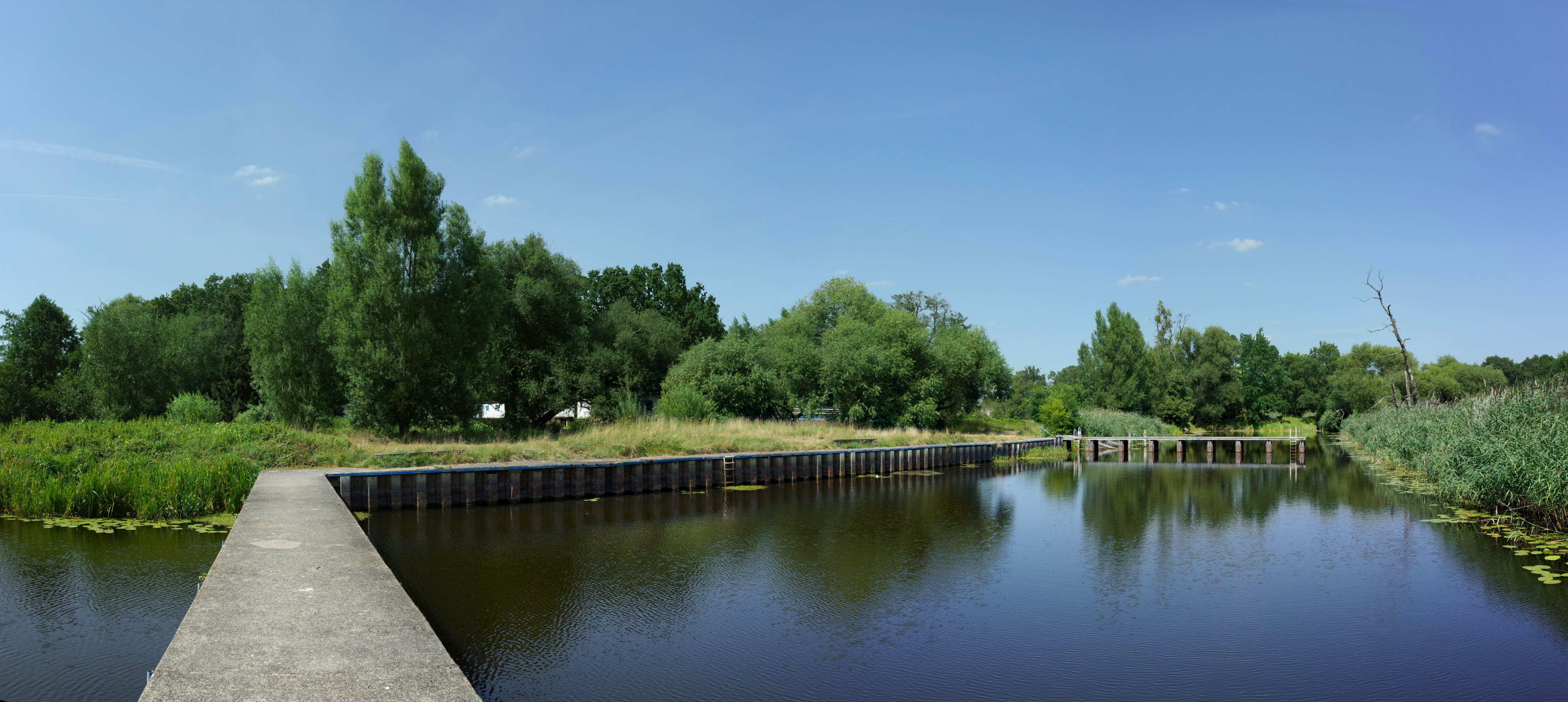 Dessau-Roßlau, Ortsteil Waldersee, Badeanstalt Freibad Rehsumpf.